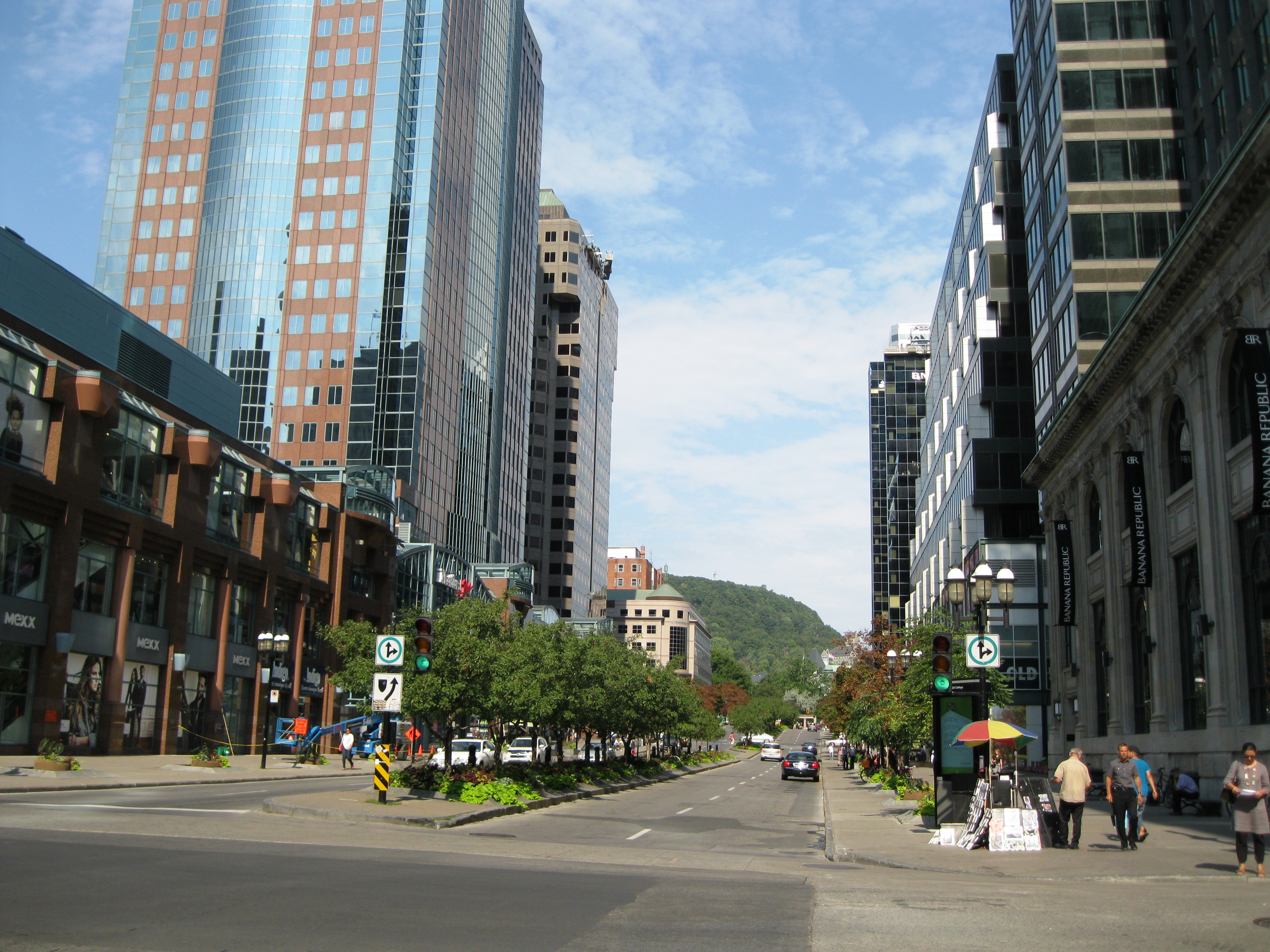 Avenue McGill College, vue de la rue Sainte-Catherine, Montréal. On aperçoit le mont Royal au fond.